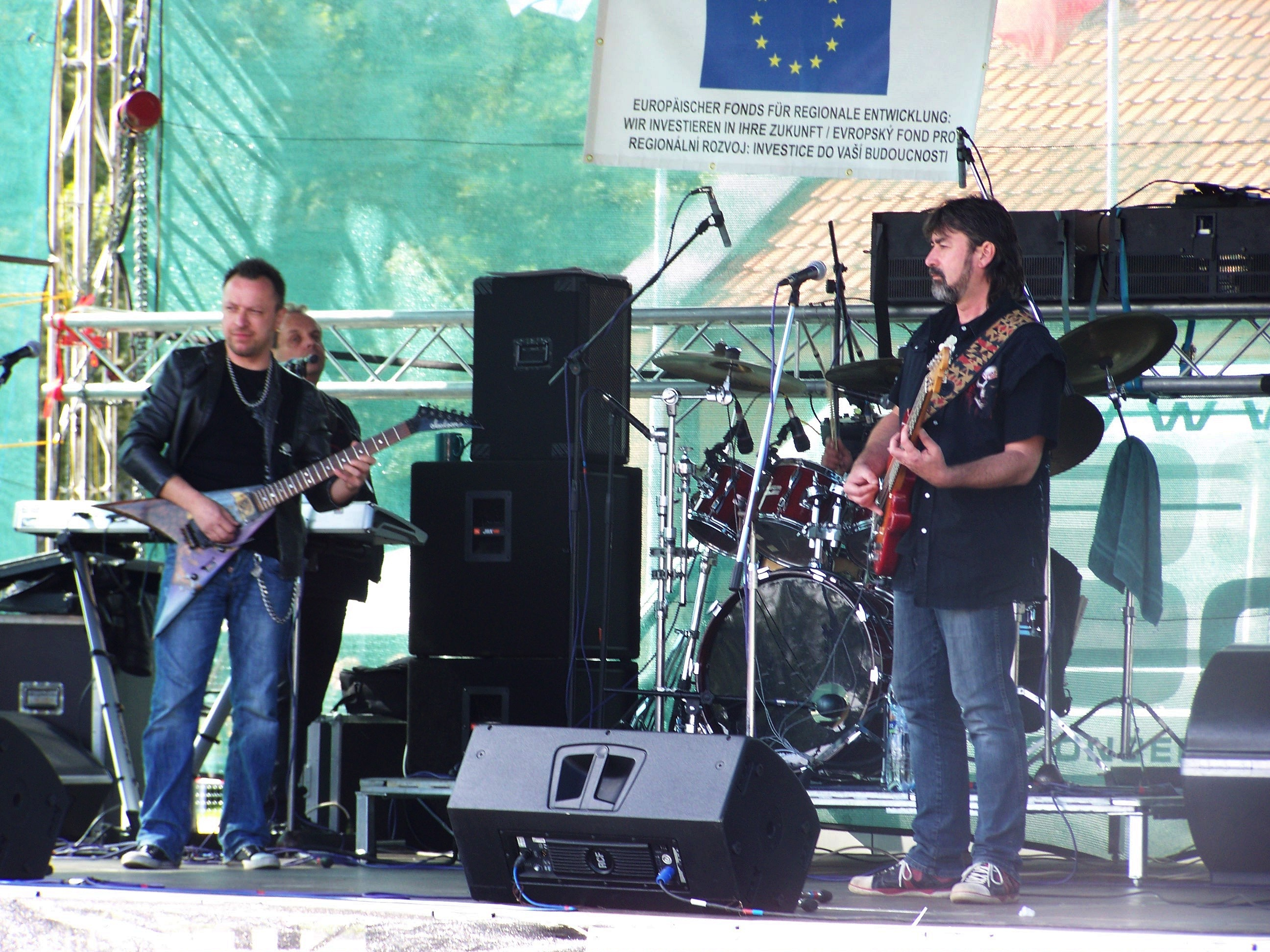 Hudební skupina Turbo na Ašských letních slavnostech 2010